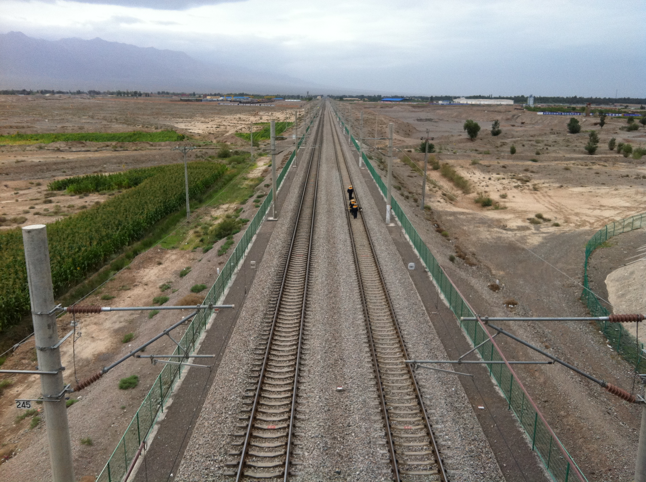 Linze, Zhangye, Gansu, China